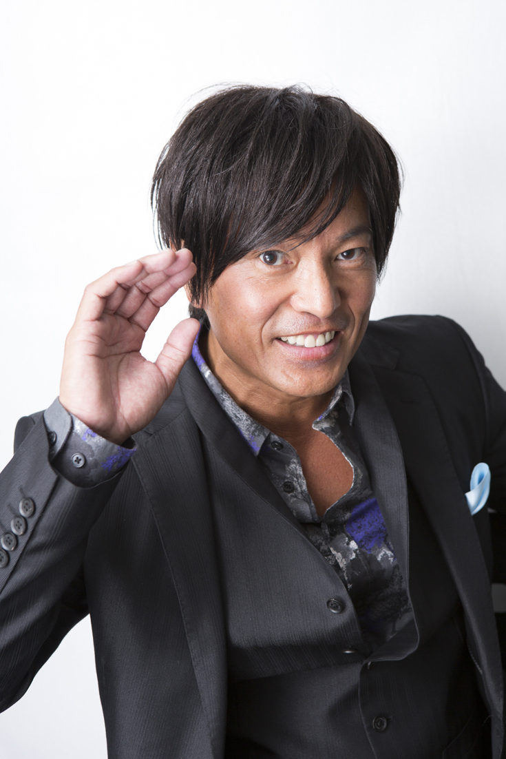 唐渡亮(「ジオラマ」撮影時)